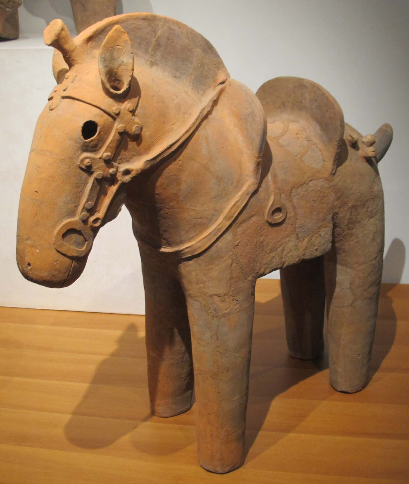 Kofun, cavallo haniwa, V-VI sec